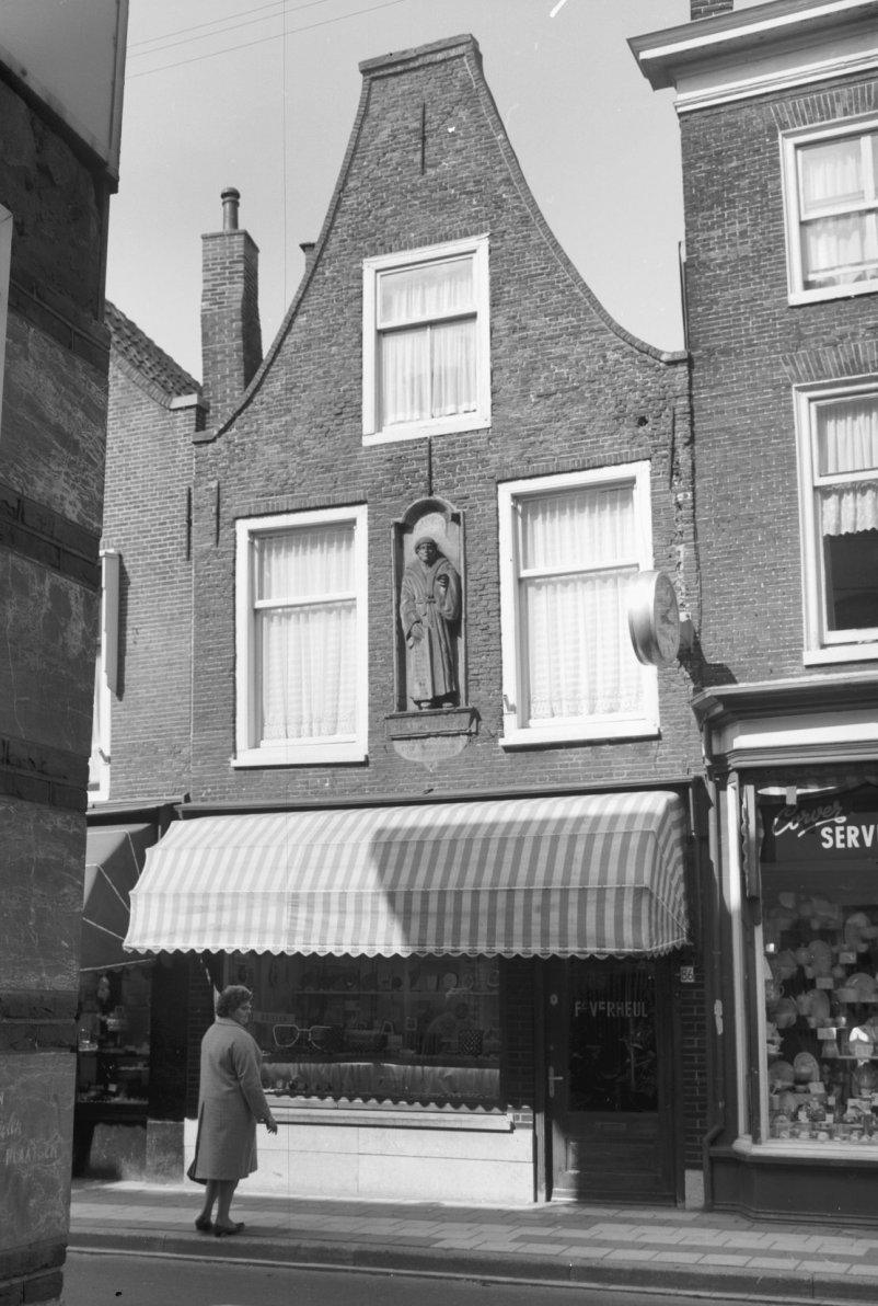 gevel